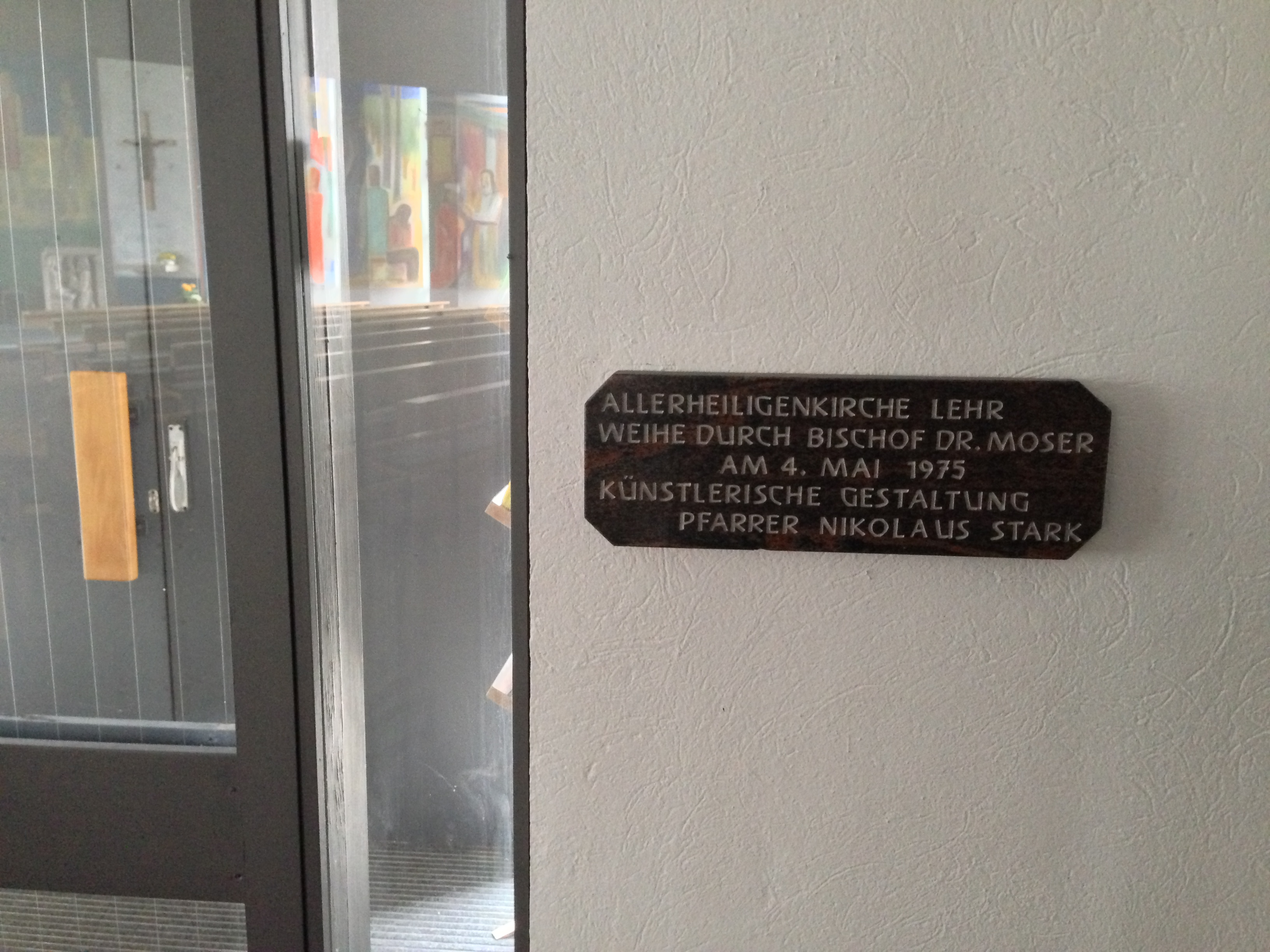 Gedenkstein zur Kirchweihe, Allerheiligenkirche Ulm-Lehr, Aufnahme vom 22.4.2013